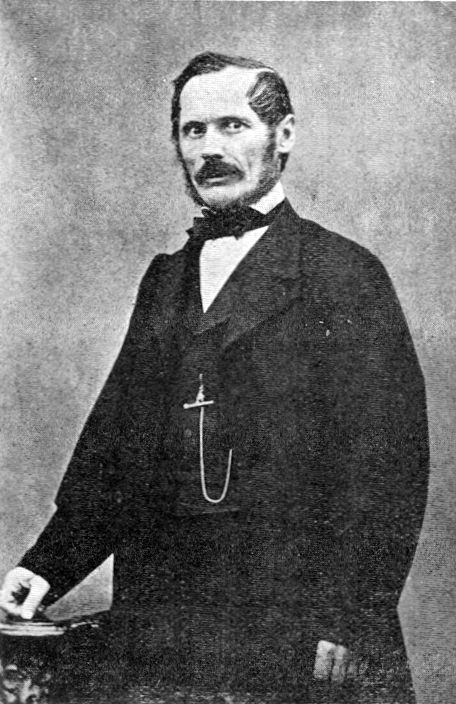 George Bariţ (1812 - 1893)